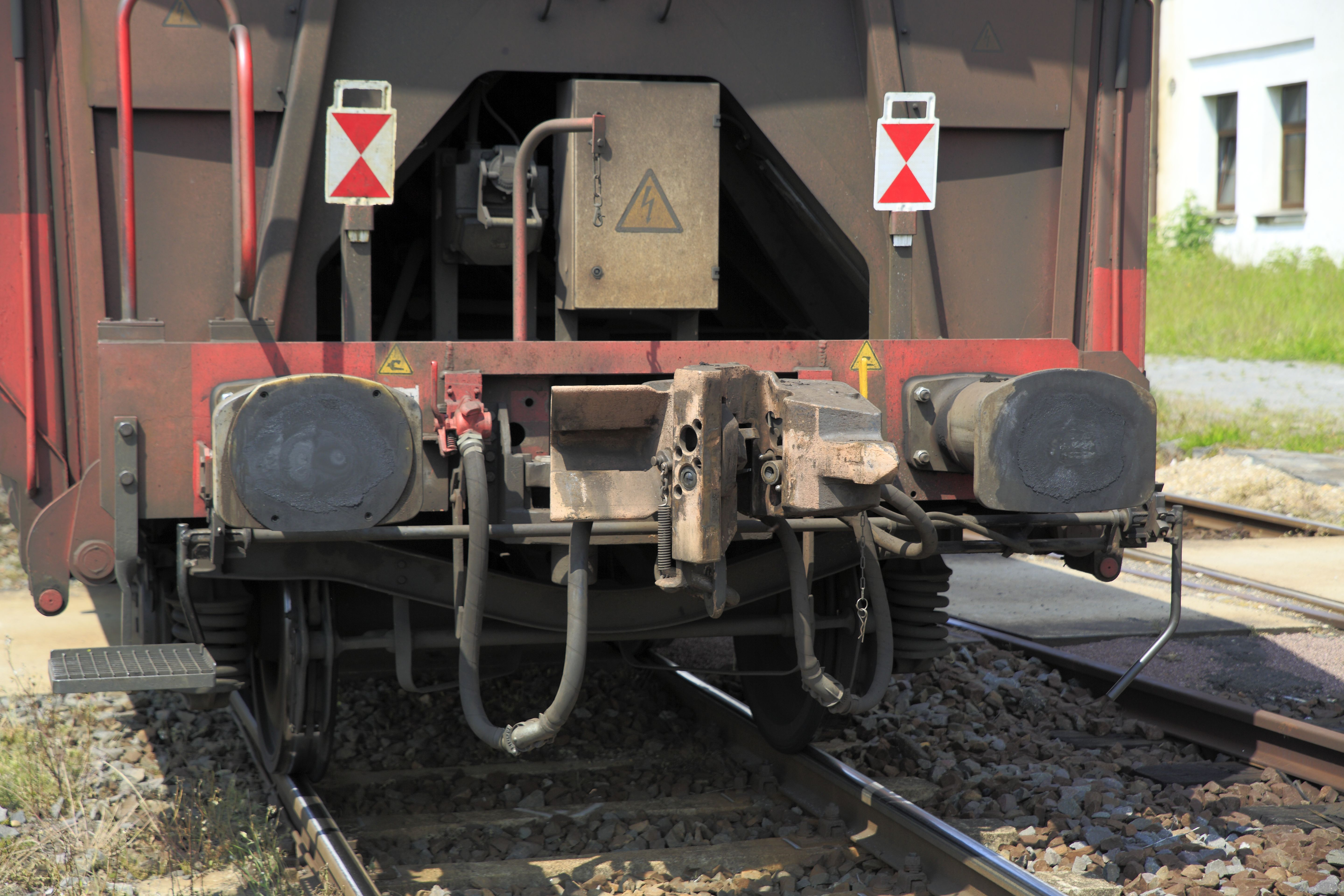 Selbstentladewagen im Kohlependel Wählitz, die Druckluftleitungen sind mittels Schlauchkupplungen angeschlossen. Trotz der Symmetrie sind beide Leitungskupplungen unterschiedlich mit Hauptluft- und Hauptluftbehälterleitung belegt.